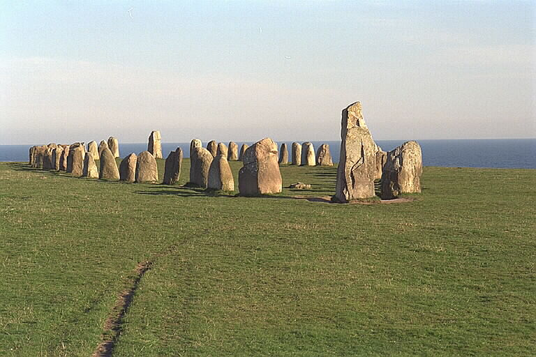 RAÄ-nummer Valleberga 20:1. Skeppssättning bestående av 58 resta stenar. Ingår i naturreservatet Hammarsbackar-Kåsebergakusten Motiv: Valleberga 20:1 Nyckelord: Naturreservat, Raä-Fastigheter Kategori: Stenkrets/domarring/skeppssättning RAÄ-nummer Valleberga 20:1. Skeppssättning bestående av 58 resta stenar. Ingår i naturreservatet Hammarsbackar-Kåsebergakusten. Valleberga 20:1.